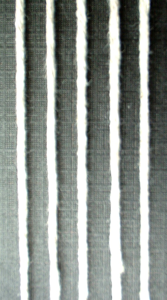 Handstrick-Recyclinggarn 30 tex x 2 x 7 aus CO/PES (65/35)